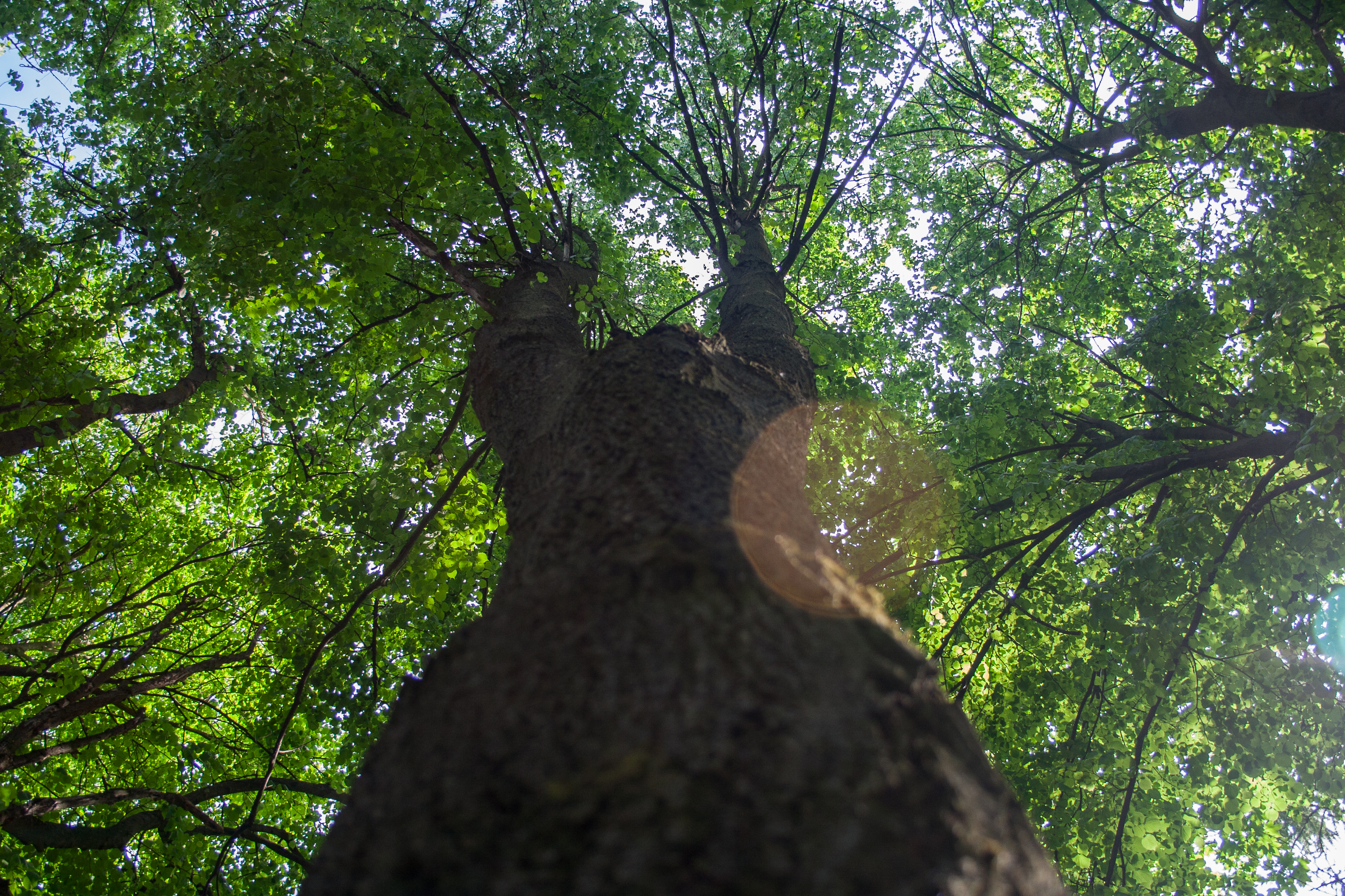 Дендропарк «Поділля», м. Хмельницький, на перетині проспекту Миру та Старокостянтинівського шосе